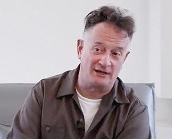 Tom Klinkowstein